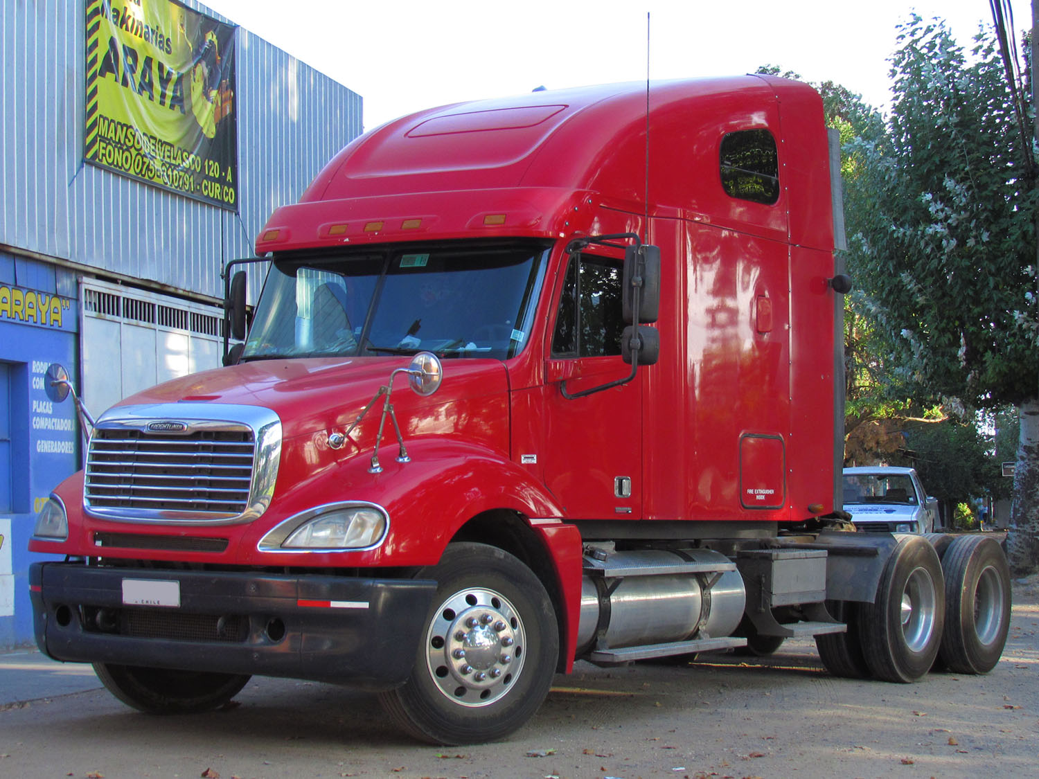 clcolumbia